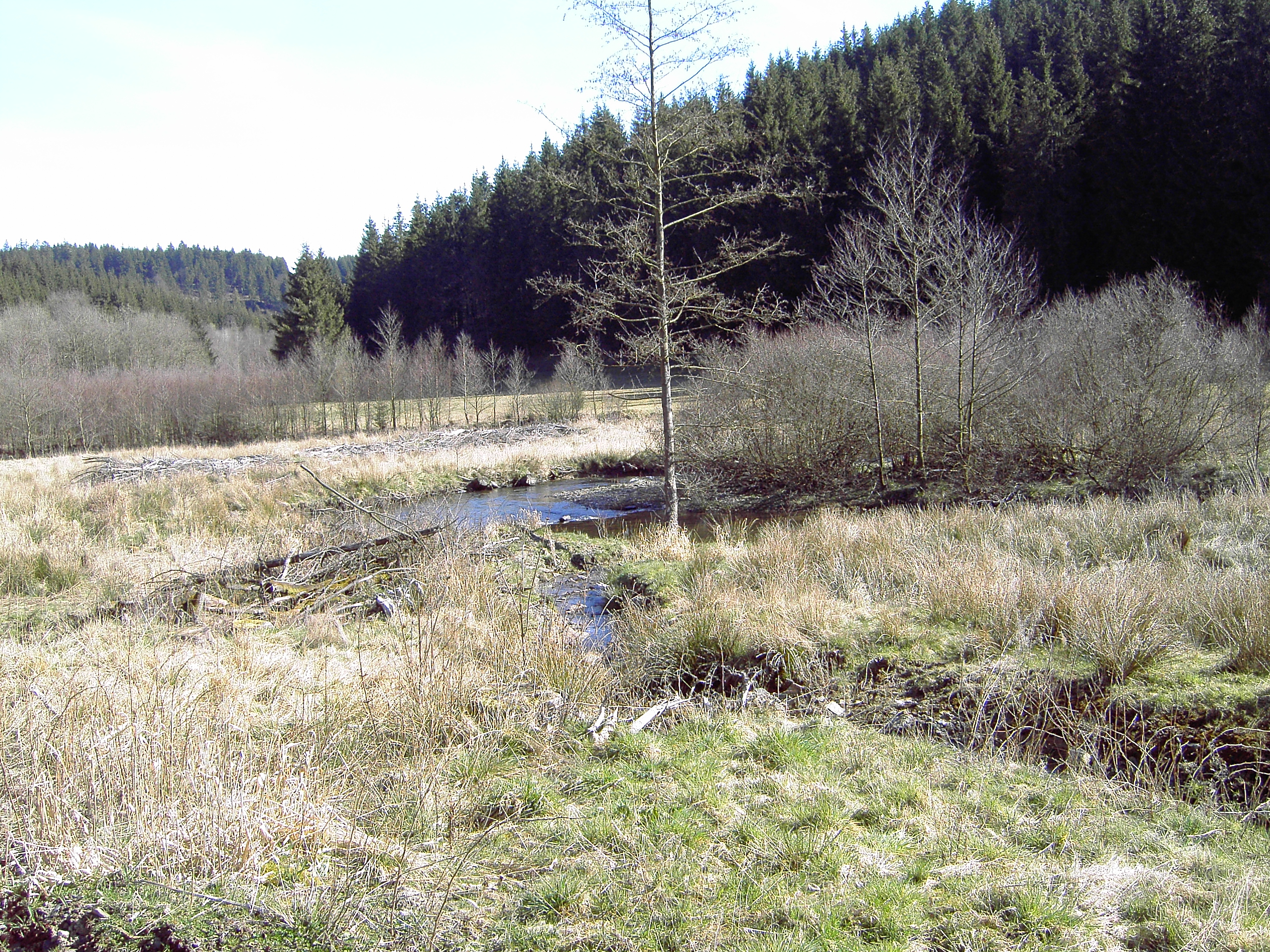 Das Foto zeigt den Lauf des Perlenbachs in der Nähe von Höfen/Eifel, Naturschutzgebiet „Perlenbach-Fuhrtsbachtal-Talsystem“